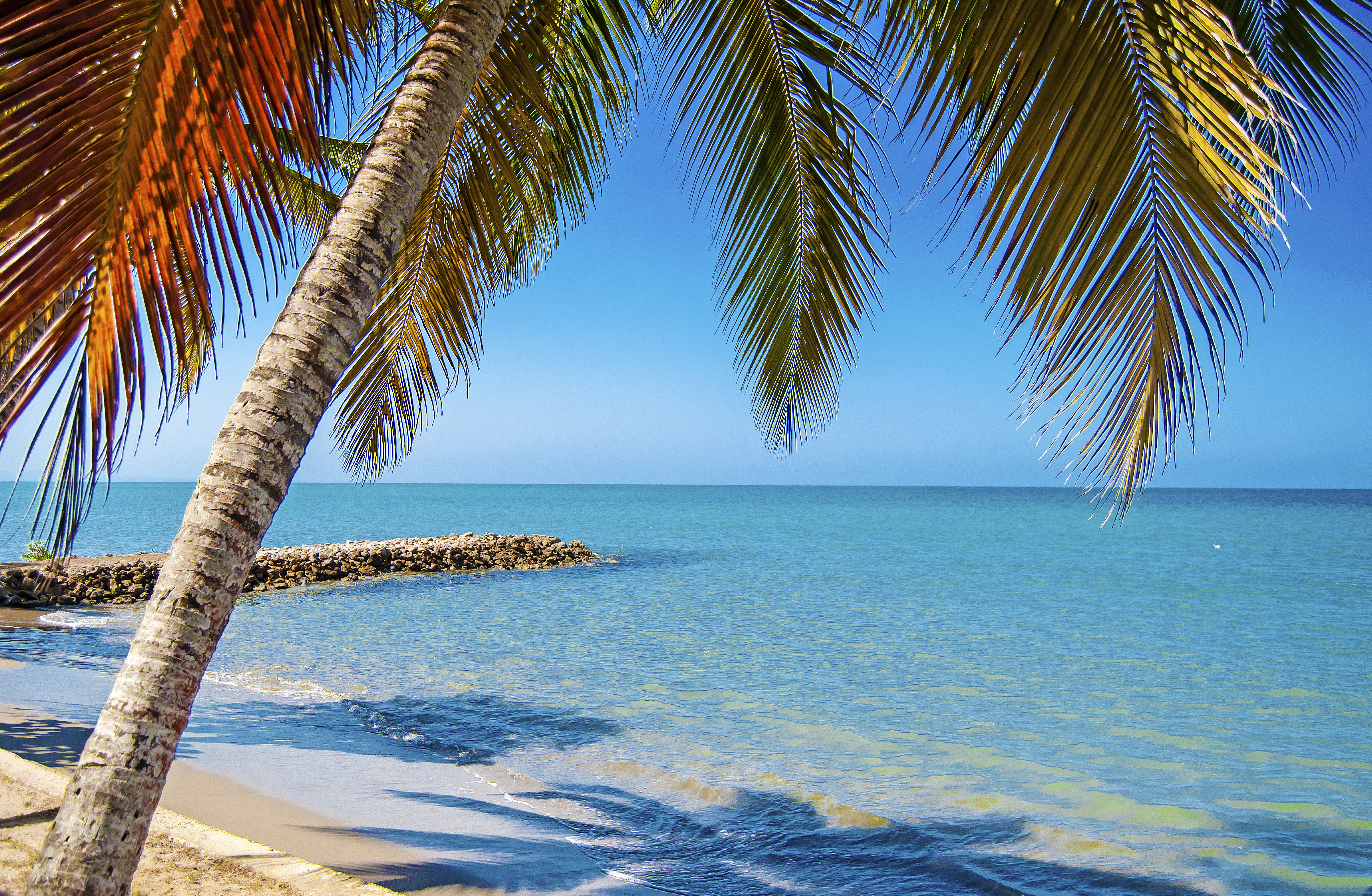 Tolú nos regala paisajes que jamás olvidaremos. Esta fotografía fue tomada en el municipio colombiano con código 70820.